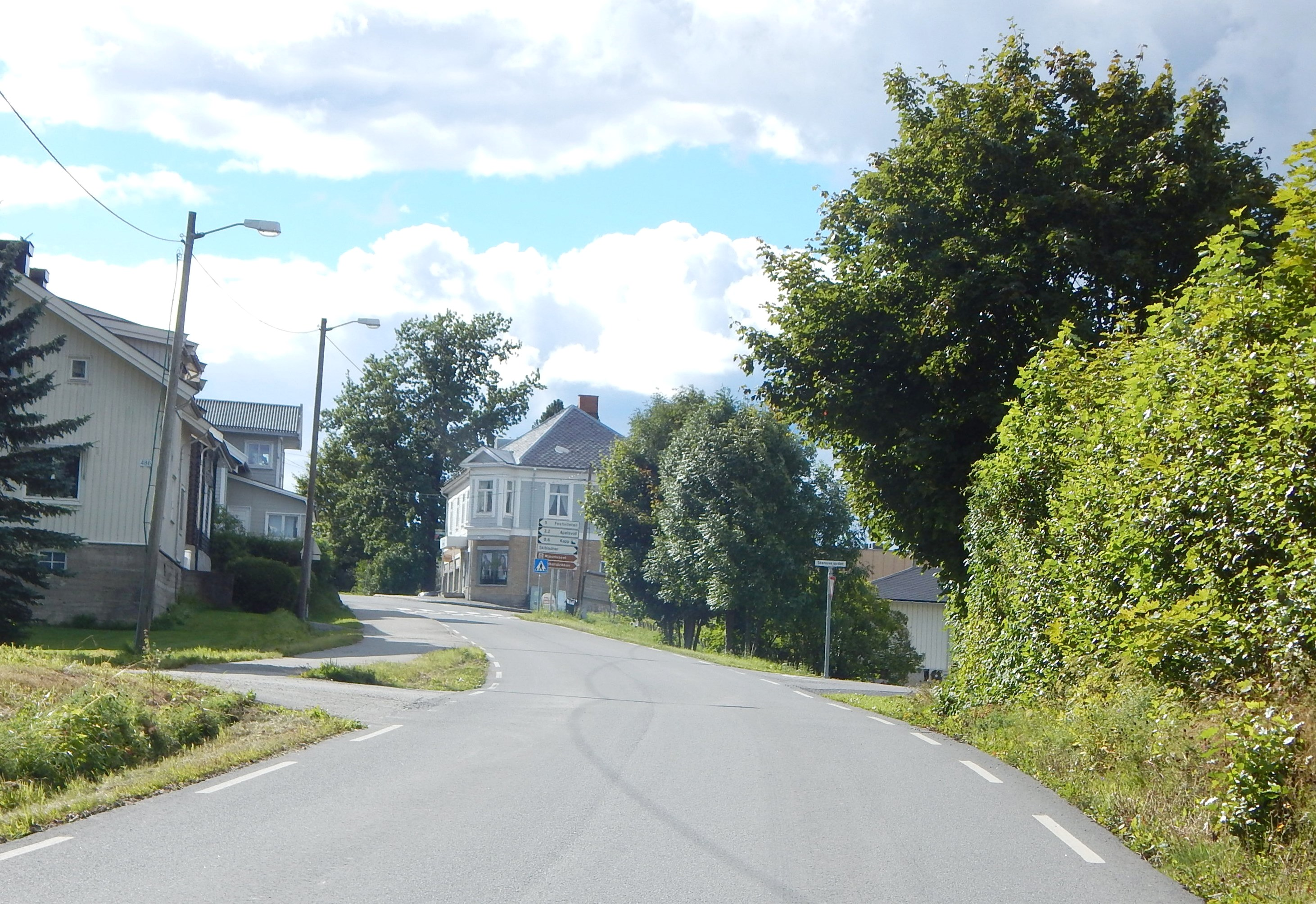 Mjøsvegen (fylkesvei 2366, tidl. 92) ved Kapp